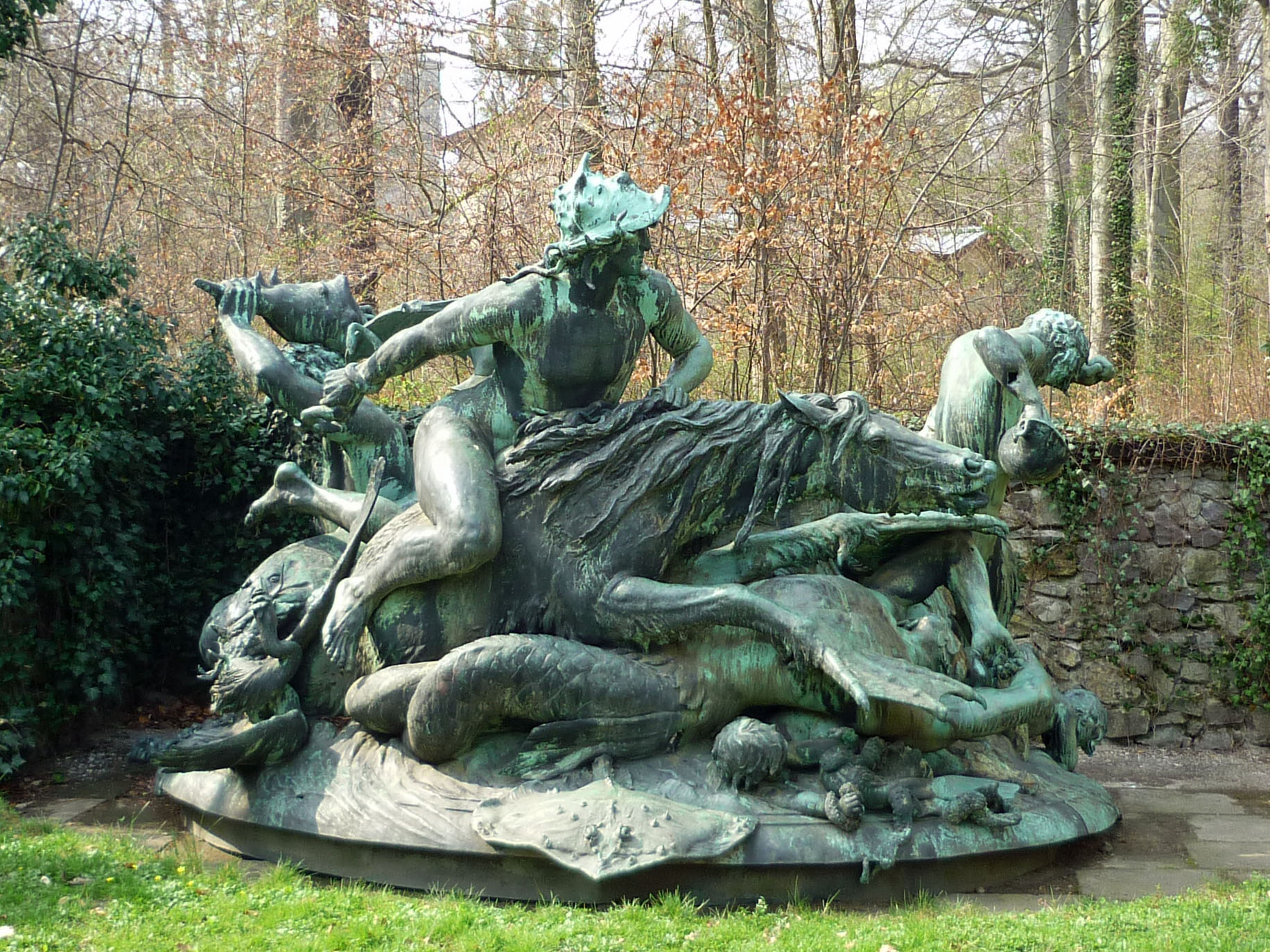 Plastik Stürmische Wogen von Robert Diez im Park von Schloss Eckberg in Dresden; Zweitabguss der Brunnenplastik für die Weltausstellung in Paris 1900, zunächst Privatgrundstück, dann Bürgerwiese, seit 1989 im Park von Schloss Eckberg